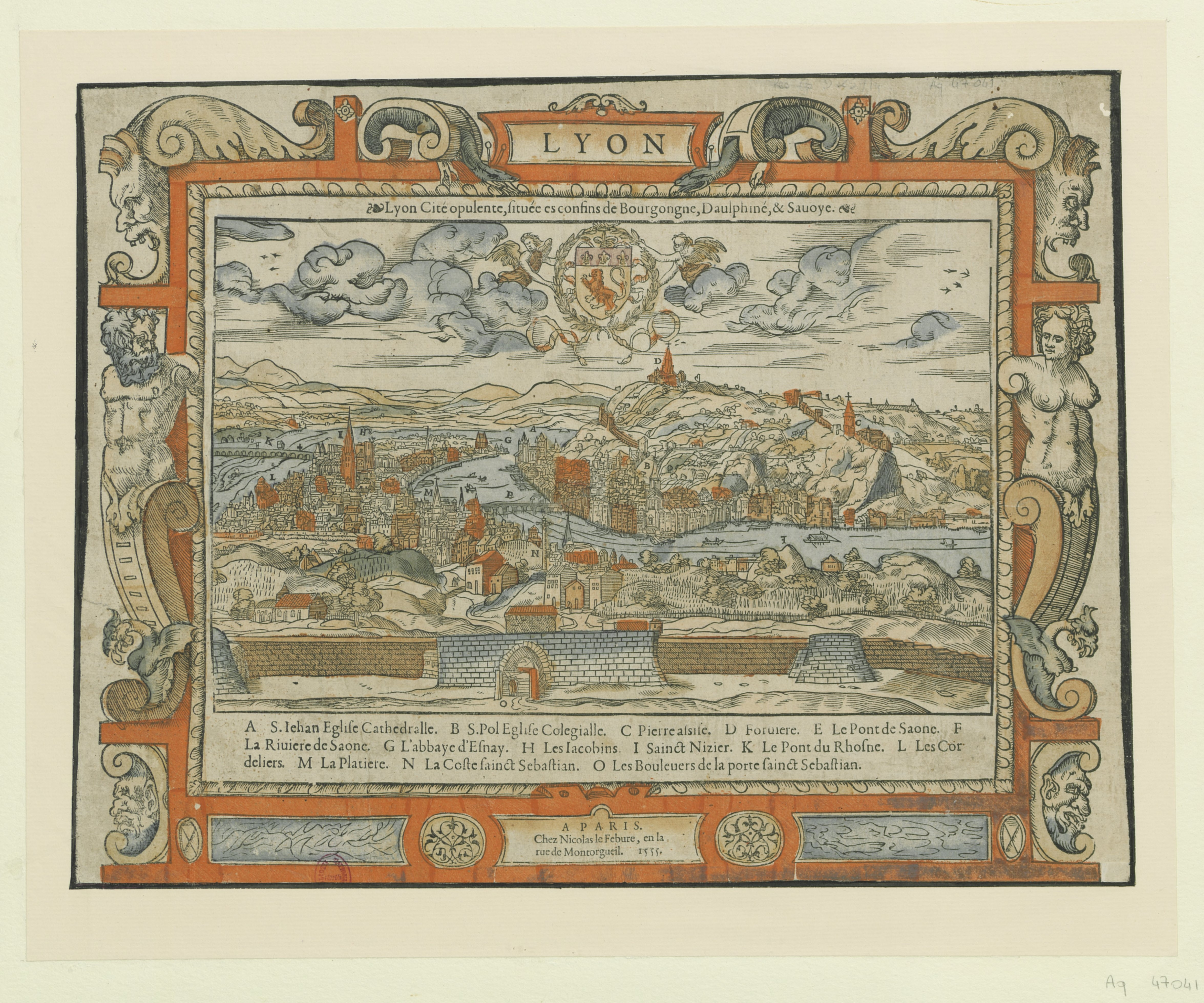 Lyon Cité opulente située es confins de Bourgongne, Daulphiné & Savoye.